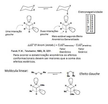 Efeito Anomérico Generalizado